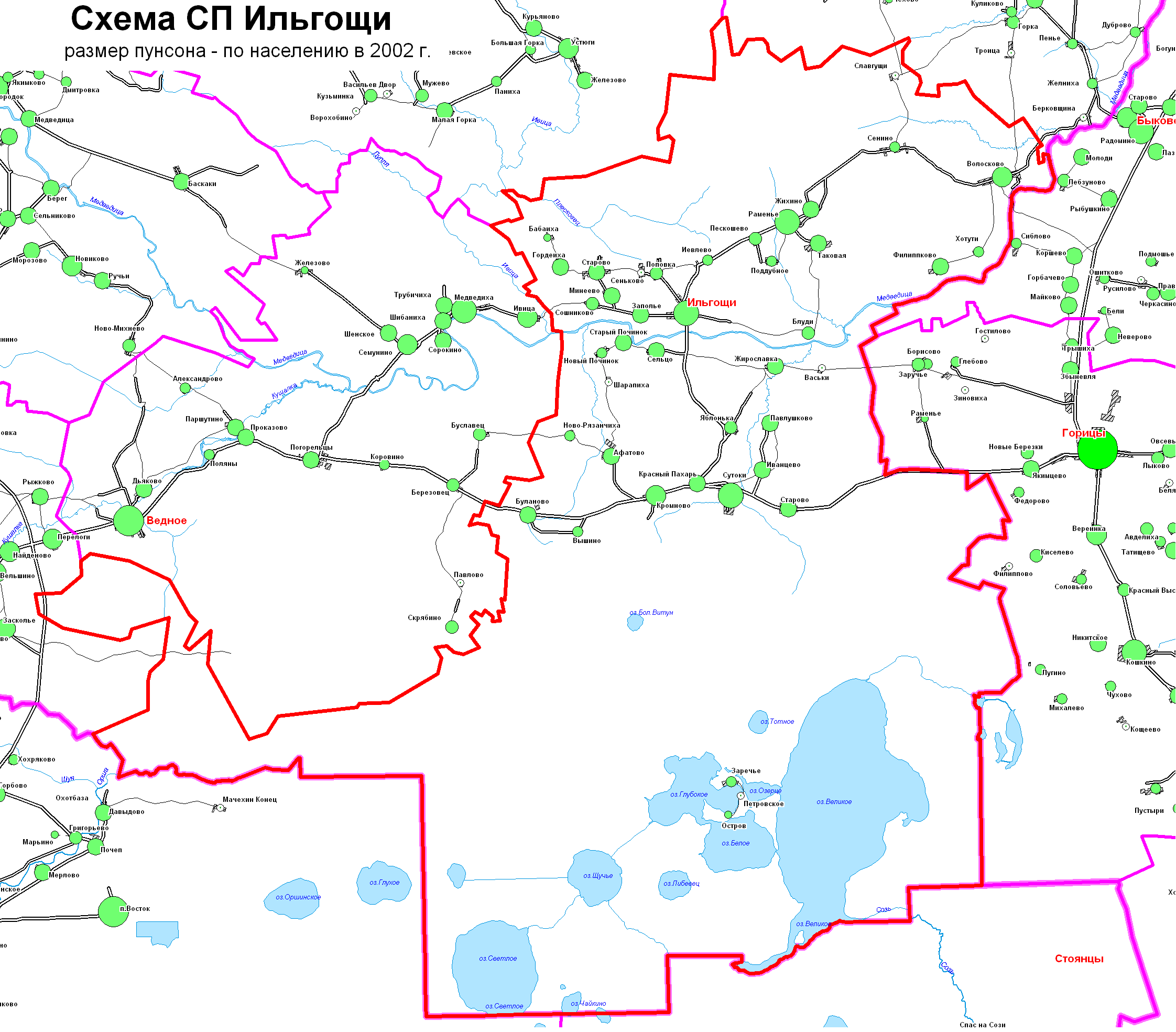 Схема сп Ильгощи Тверской области